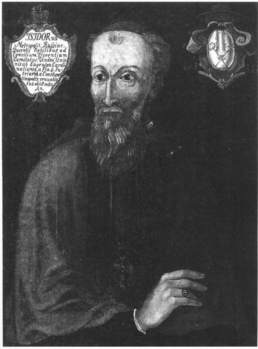 Isidoro (1380/1390 - 1463) - Metropolita de Kiev e Toda a Rús, cardeal, decano do Colégio dos Cardeais, patriarca de Constantinopla, Arcebispo de Chipre.